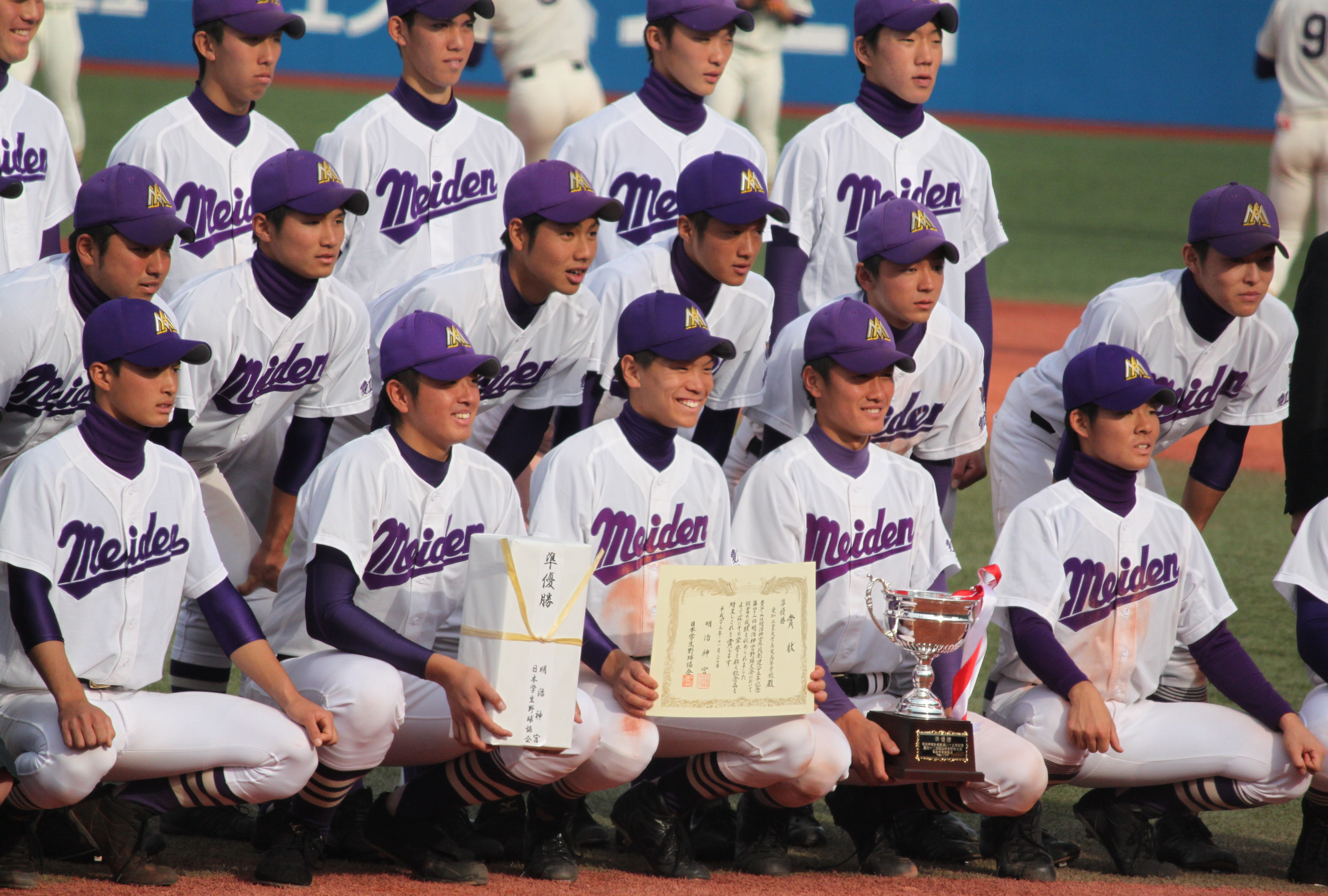 愛知工業大学名電高等学校 野球部